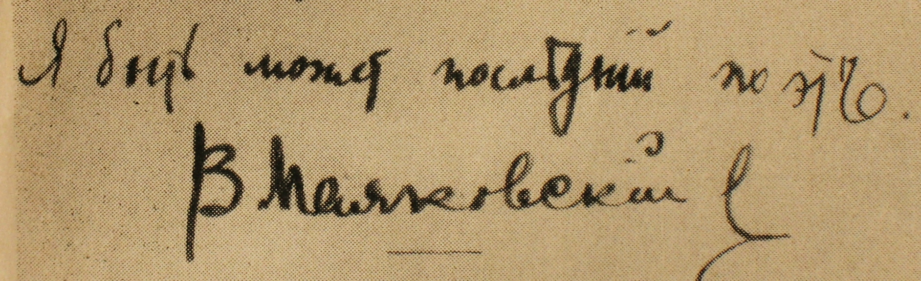 Владимир Маяковский: "...Я быть может последний поэт". Автограф. К. Чукoвский, "Современники", ЖЗЛ, Москва, издательство "Молодая гвардия".